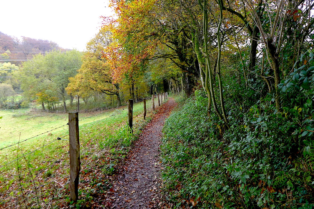 "Тропа Клинка" - туристский маркированнный маршрут вокруг немецкого города Золинген (Северный Рейн-Вестфалия). Восьмой этап: между Вуппером и Иттером. 7.2 км.